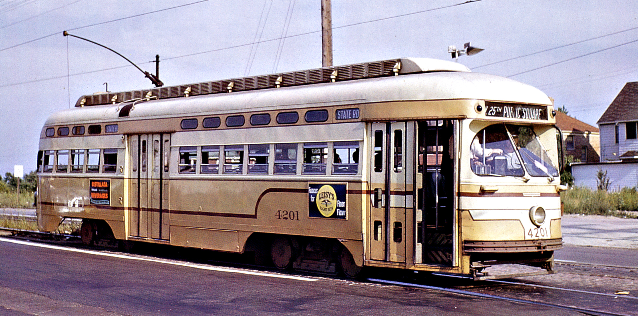 PCC in Cleveland – Raymond Loewy design. Opname, door mijzelf gemaakt in de jaren 1950.